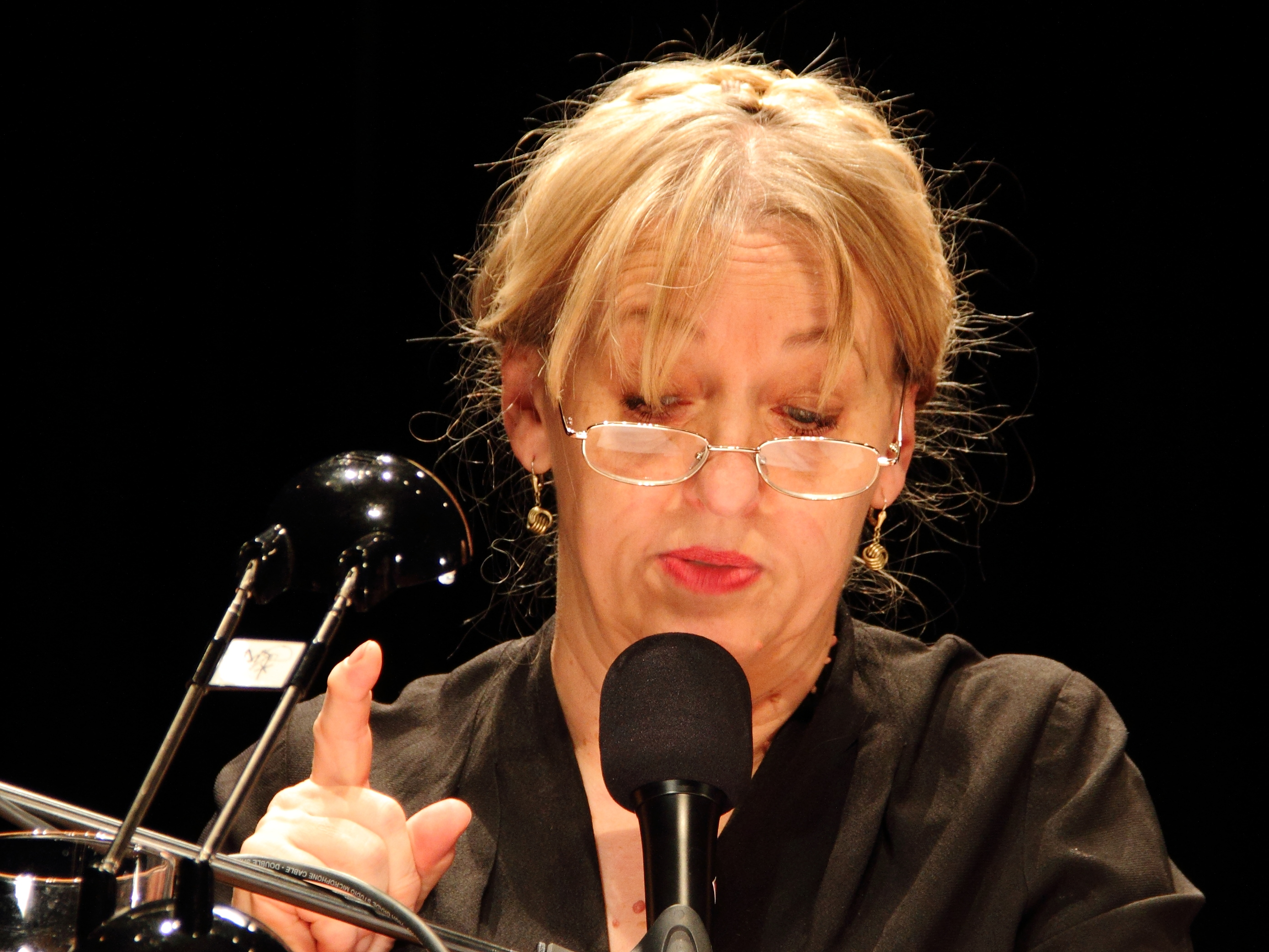 Johanna Bittenbinder in der szenischen Lesung des Romans Tannöd von Andrea Maria Schenkel in der Alten Turnhalle Niederstetten.